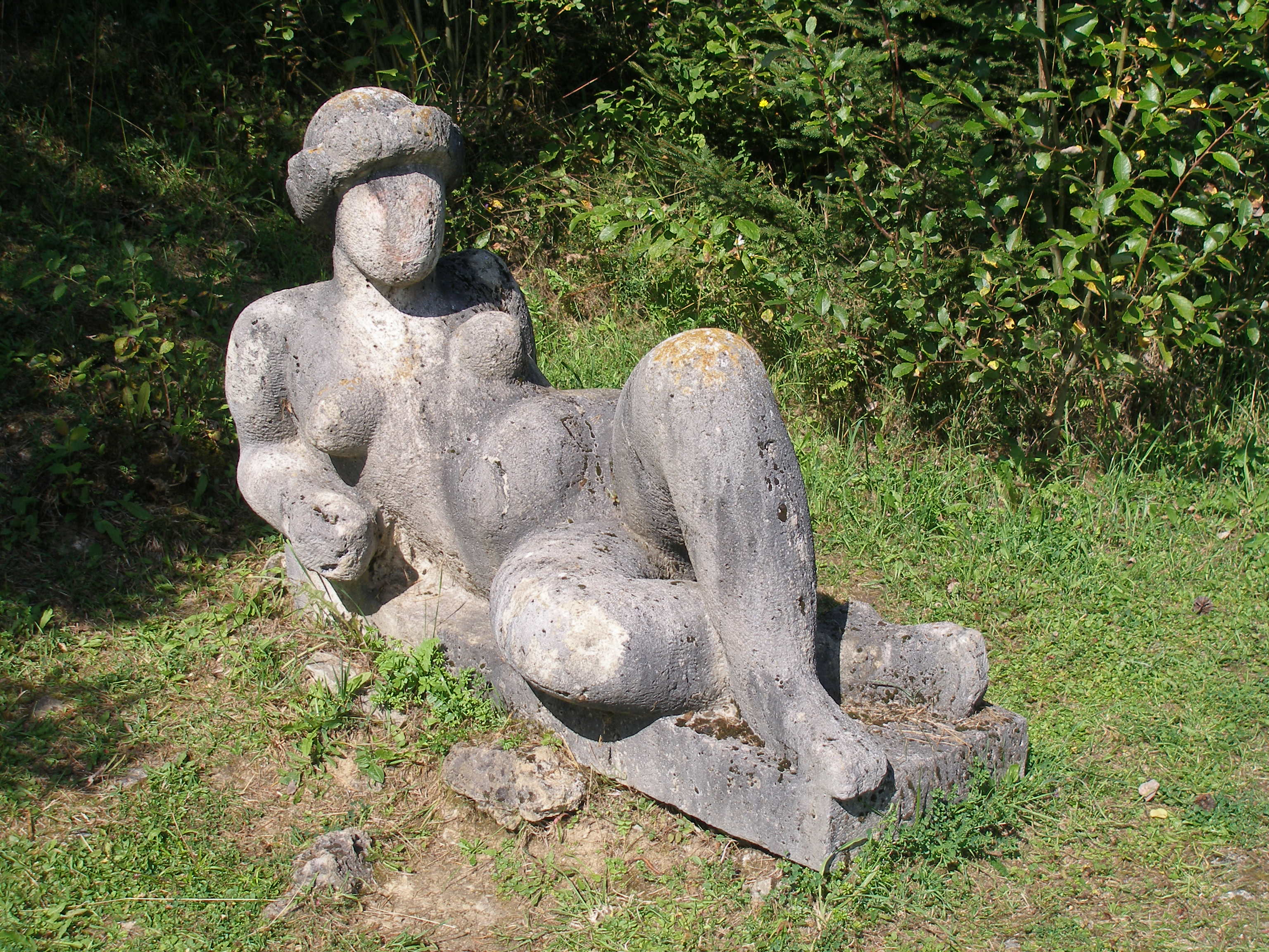 Sochy v Prírode. Kameňolom Vyšné Ružbachy. Okres Stará Ľubovňa.